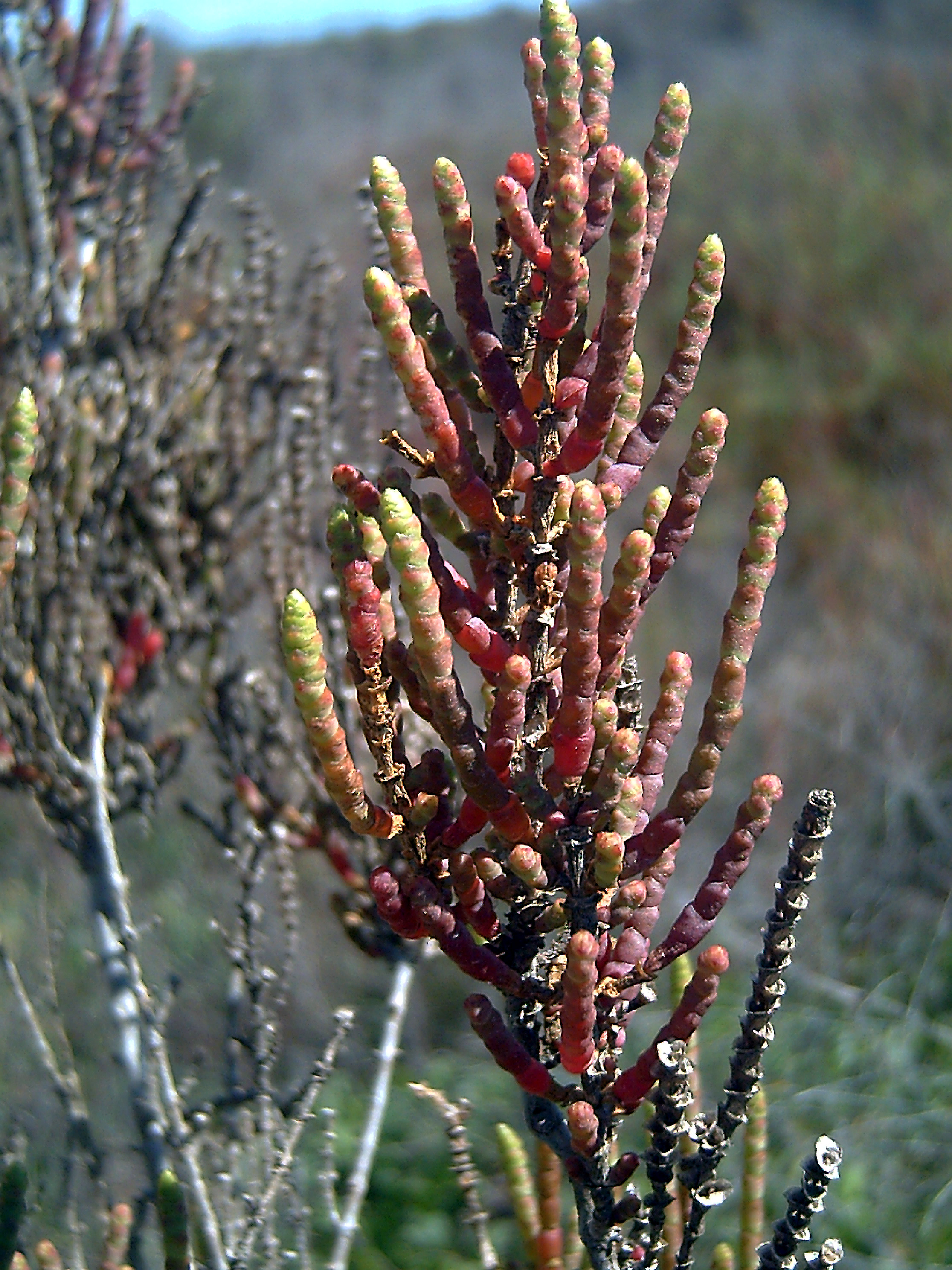 Arthrocnemum_macrostachyum en La Mata Torrevieja, Spain. Cette espèce supporte des atterrissements considérables et des inondations prolongées (Simoneau, 1952)